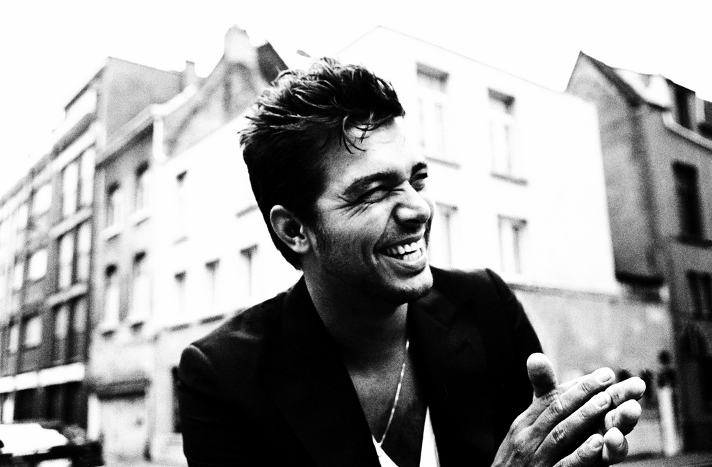 Official press photo